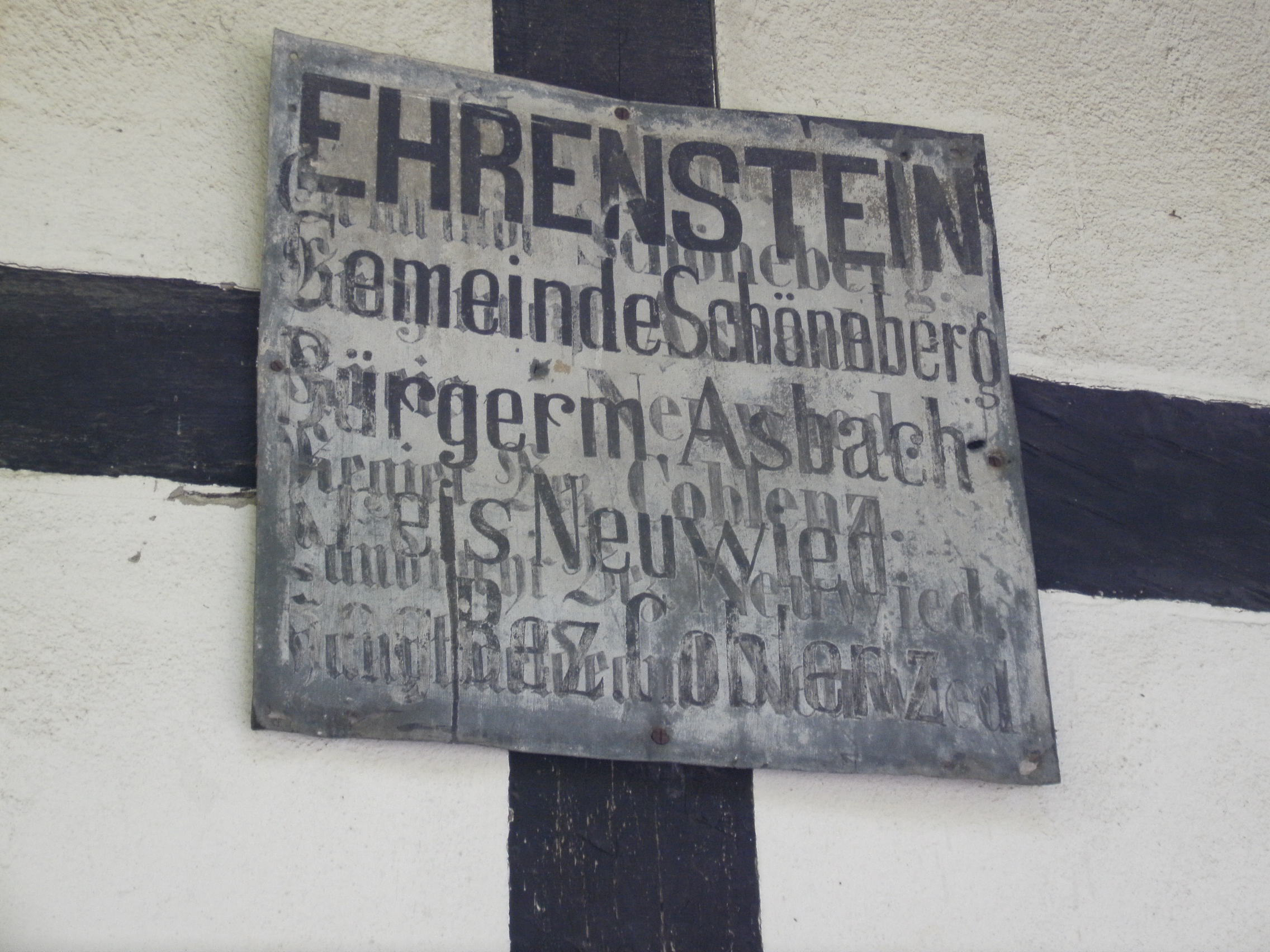 Asbach (Westerwald) Ortsteil Ehrenstein Preußisches Ortsschild